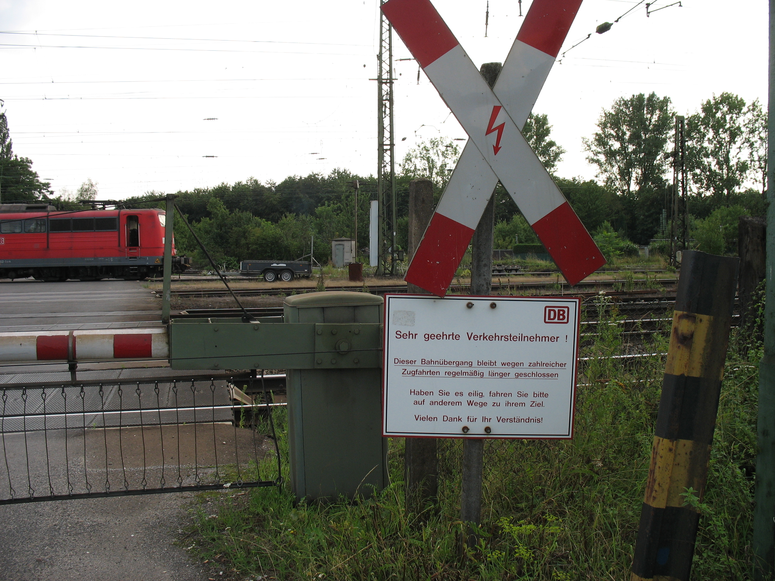 Bahnübergang am (Gremberger Ring) mit dem Hinweis zu längeren Wartezeiten an Straßenverkehrsteilnehmer